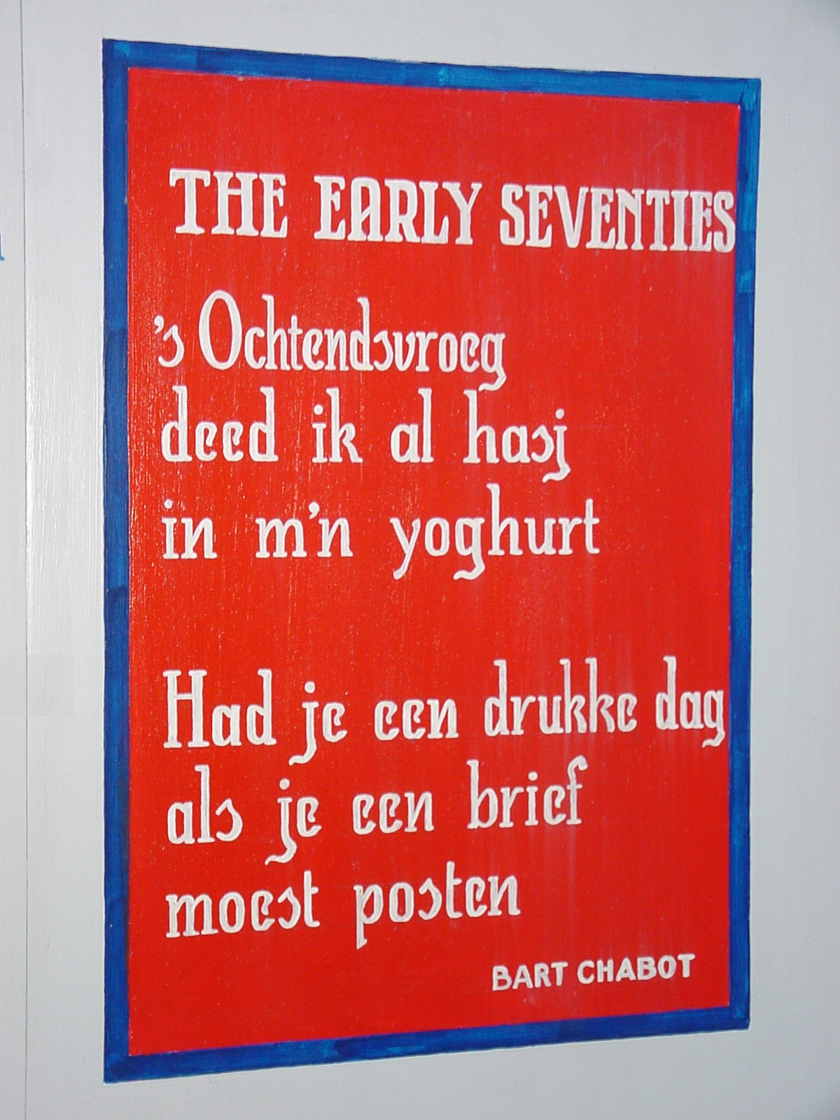 Bart Chabot - The early seventies. In 2002 aangebracht in "De Zaak", Ir. Driessenstraat 11, Leiden